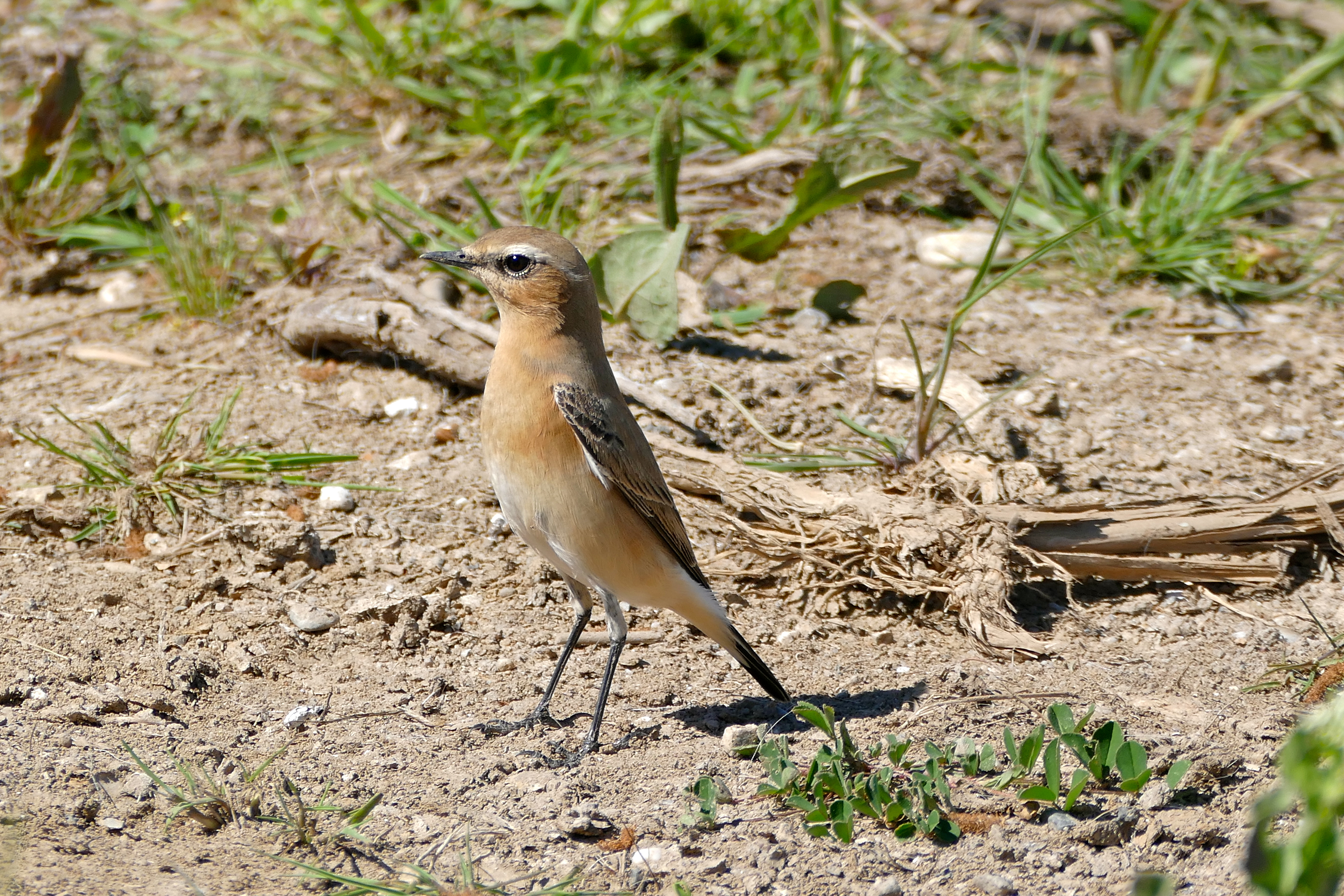 Estanys del Matar, Los Aiguamolls del' Empordà, Castelló d'Empúries, Catalunya, SPAIN